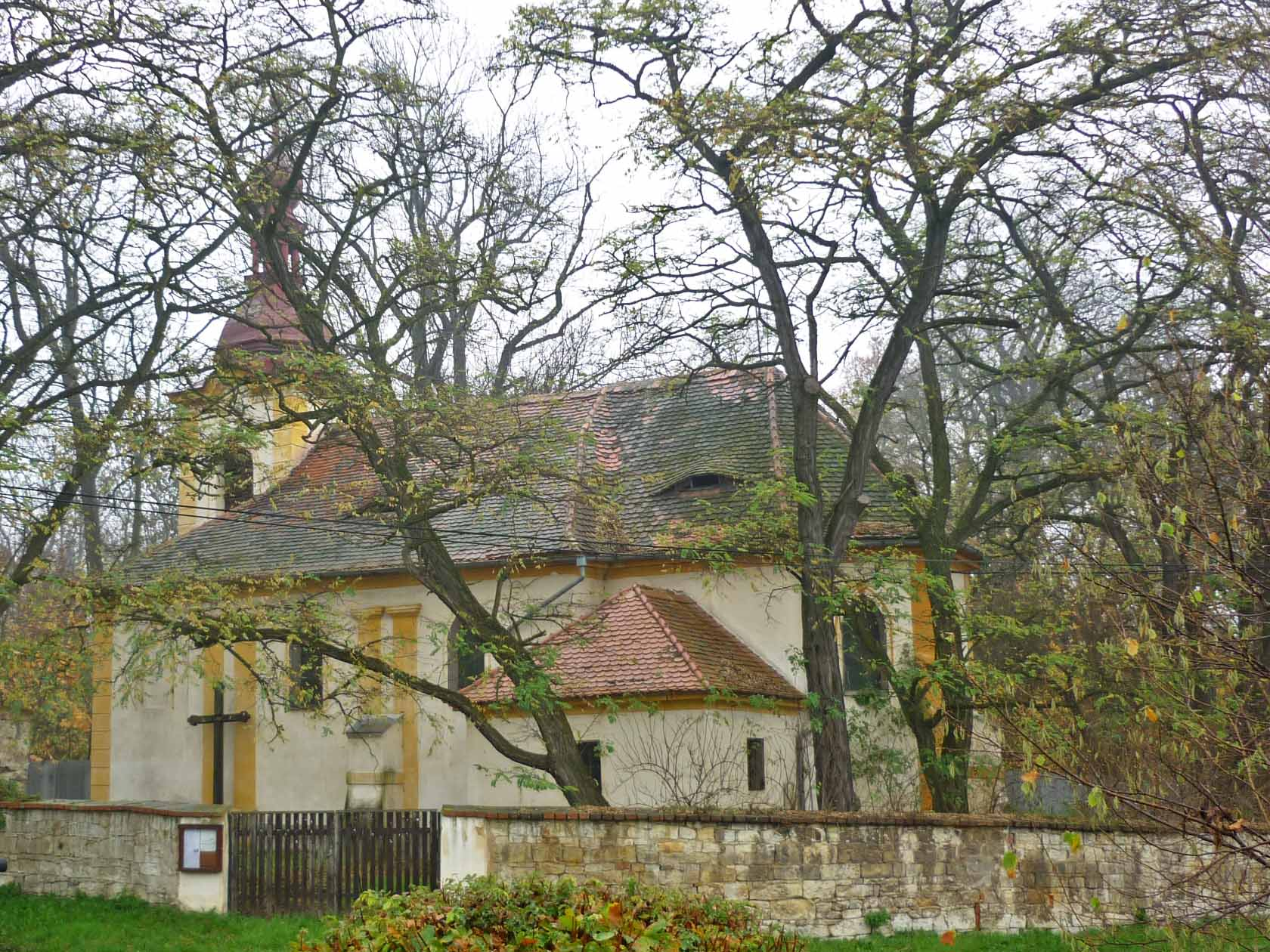 Kirche in Dobritschan (Dobříčany)